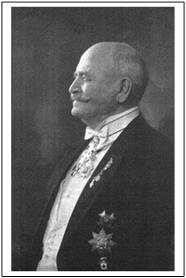 Karl Andreas Koefoed (1855-1948)